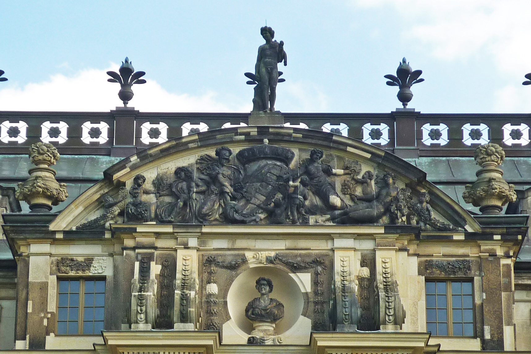 Segmentgiebel der Westfassade des Palais im Großen Garten in Dresden